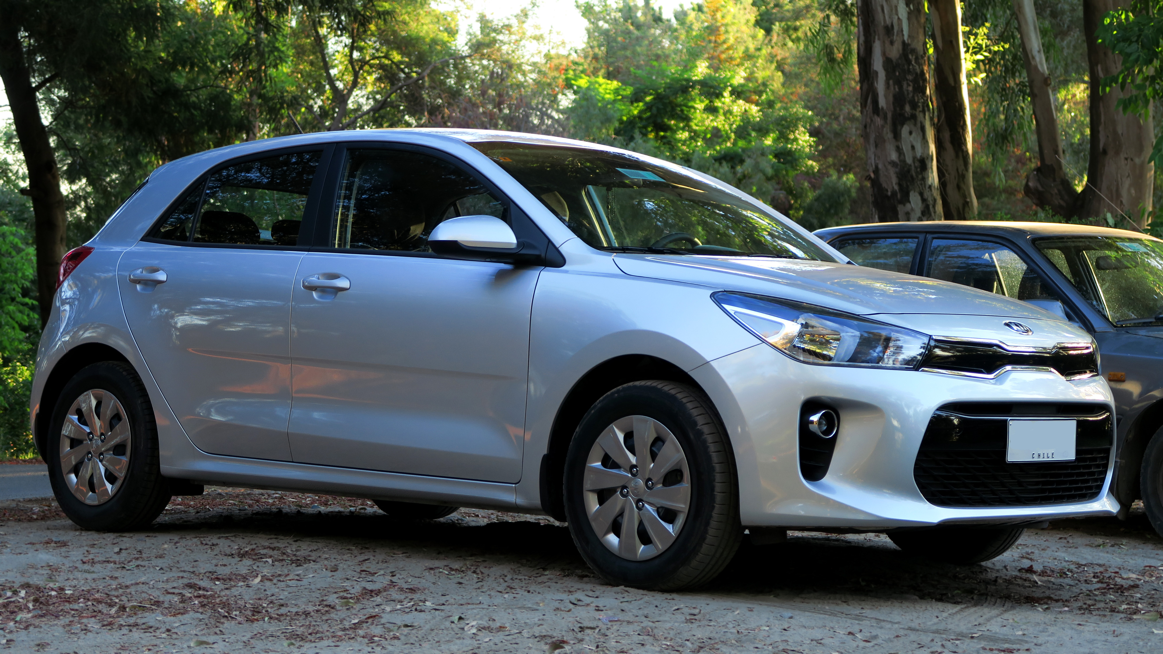 Kia Rio5 1.4 EX 2018